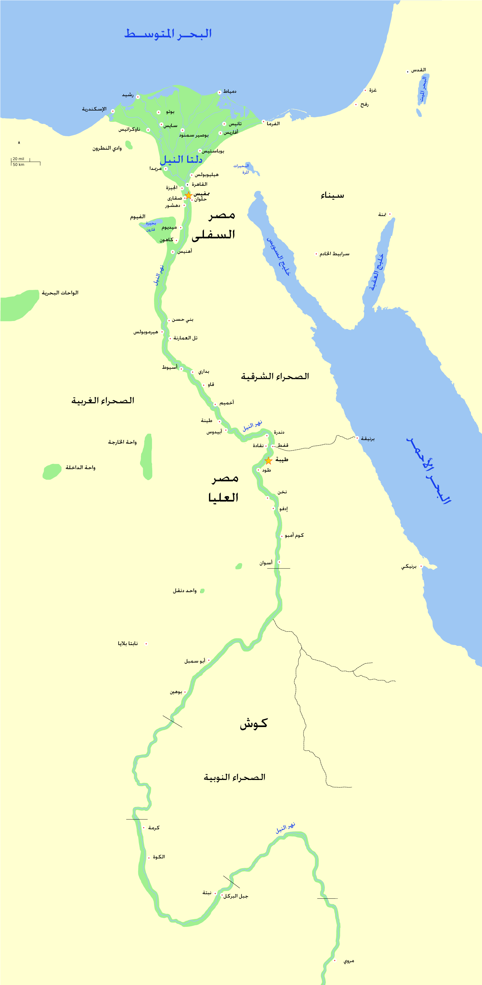 خريطة لمصر القديمة، حيث يظهر نهر النيل، والمدن الرئيسية ومواقع الفترة (من حوالي 3150 ق.م إلى 30 ق.م). كما تظهر بالخريطة أيضا القاهرة والقدس كمدن مرجعية